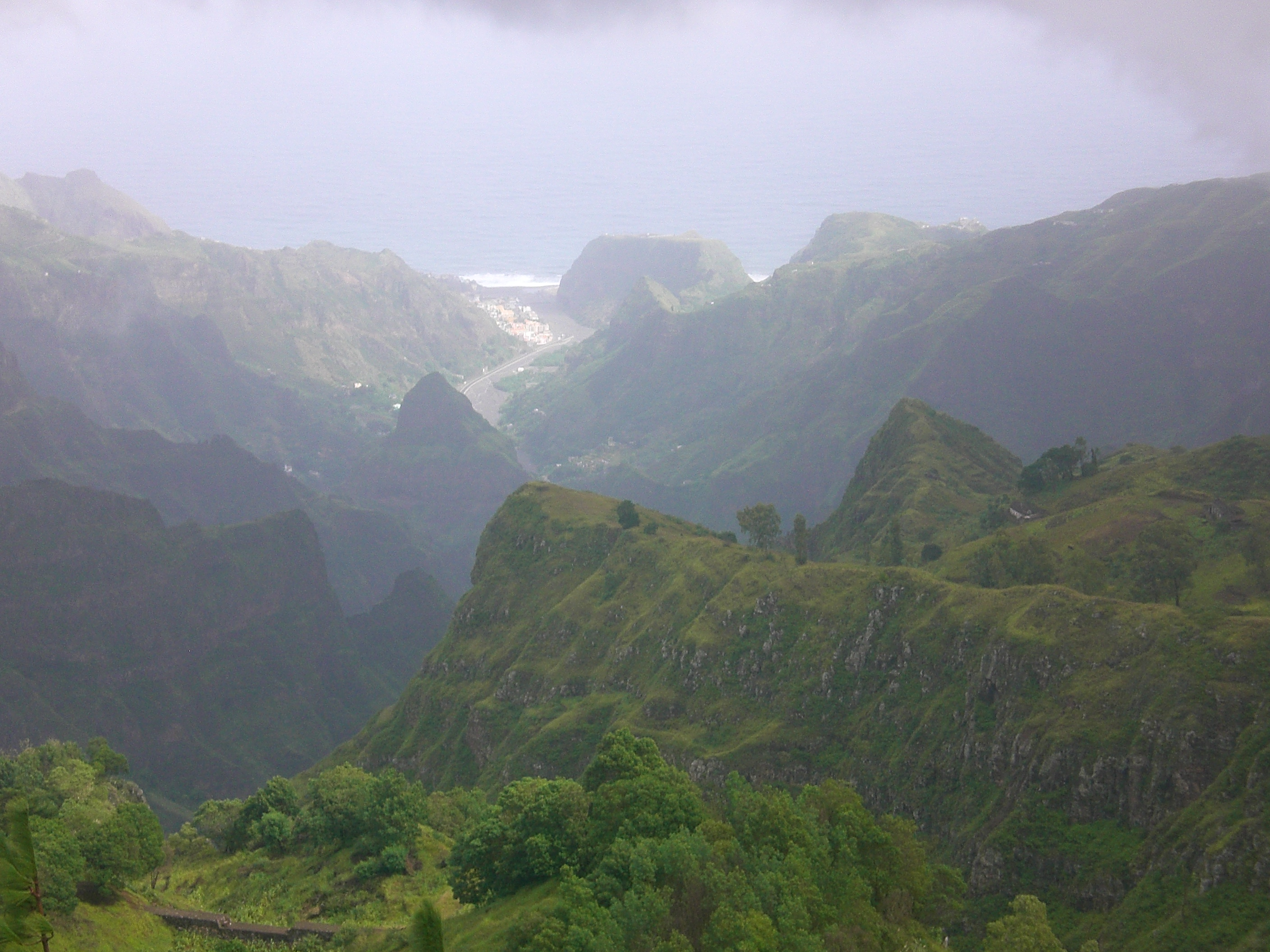 Ribiera da Torre, al fondo la ciudad de Ribeira Grande